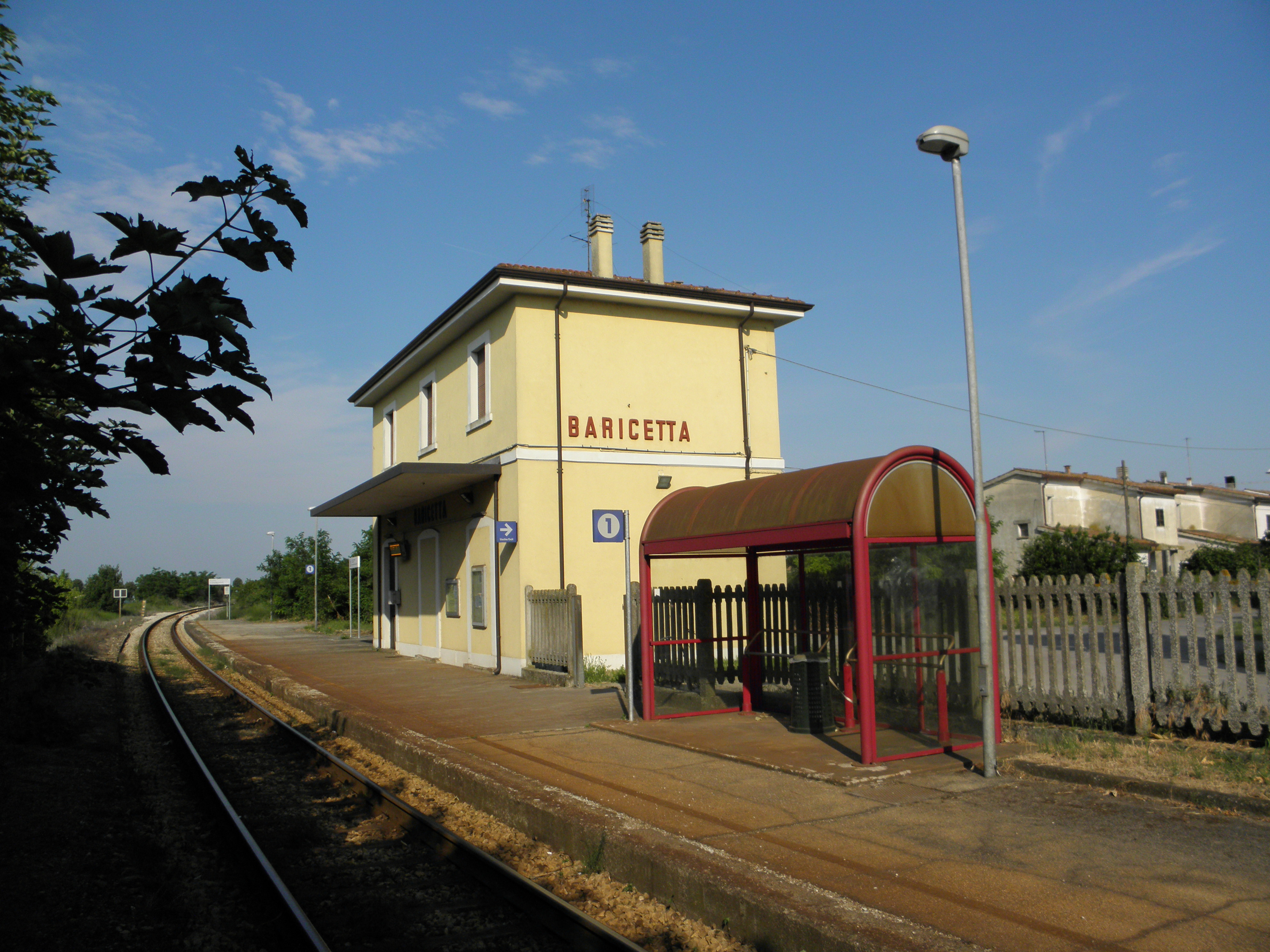 Baricetta, frazione di Adria: il fabbricato viaggiatori della stazione ferroviaria, lato piazzale del ferro.